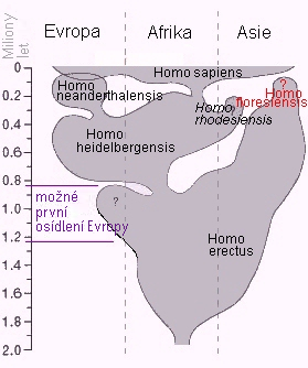 Stammbaum-Modell in Anlehnung an G. P. Rightmire: Human evolution in the Middle Pleistocene: the role of the Homo heidelbergensis, 1998 mit Ergänzungen und Änderungen des Modells nach: W. Henke/ R.W. Schmitz/ M. Street: Die späteiszeitlichen Funde von Bonn-Oberkassel, in: Rheinisches Landesmuseum: Roots - Wurzeln der Menschheit, 2006, S. 36 dazu Eintrag des Homo floresiensis :eigene Zeichnung nach Vorlage